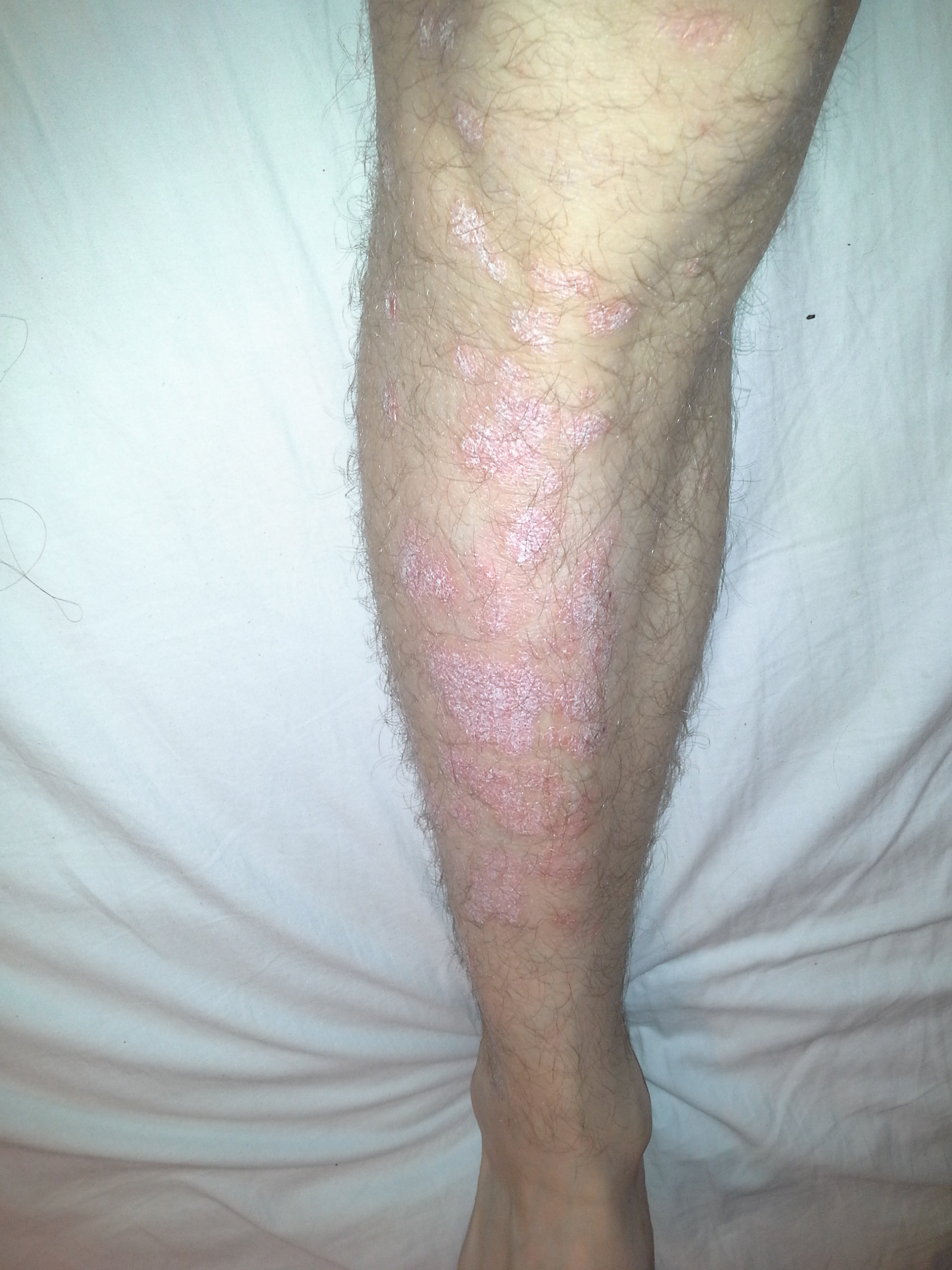 Гомілка - одне з найперших місць ураження